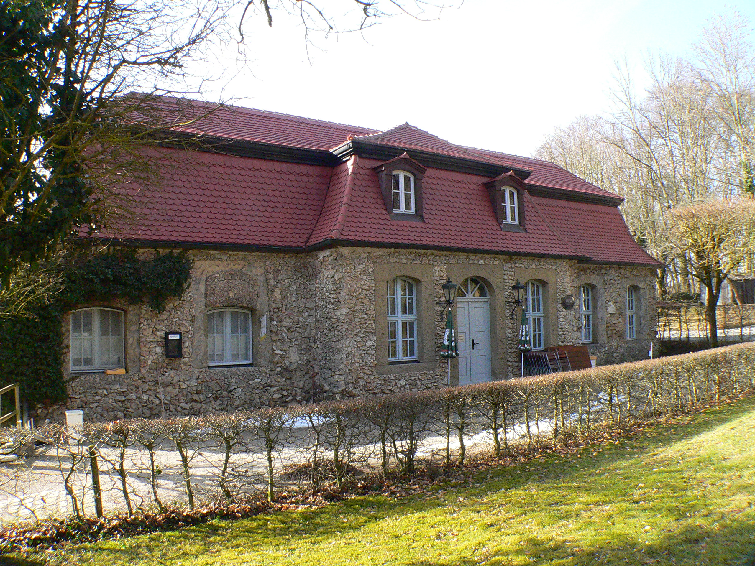 Felsengarten Sanspareil, Küchenbau 2009 - Fränkische Schweiz, Bayern